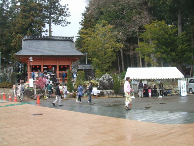 長野県松本市波田の上波田地区で、4月第3土曜と日曜日に行われる「仁王様の股くぐり」遠景。黒屋根・朱塗りの建物が、仁王像2体を納める仁王門である。